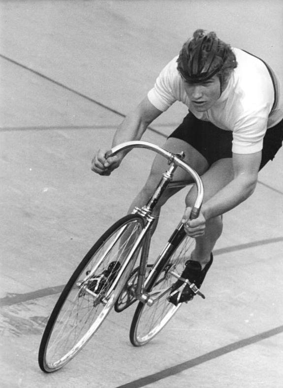 Klaus Grünke ADN-ZB Mittelstädt 21.8.75-str-Lüttich-Belgien: Klaus Grünke (DDR) wurde Weltmeister im 1 000-m-Zeitfahren - Der Berliner TSC-Fahrer (Foto von einem früheren Wettkampf) errang den WM-Titel in 1:08,30 min. Titelvertiediger Eduard Rapp (UdSSR) wurde mit zwölf Hundertstel Sekunden Rückstand Vizeweltmeister.